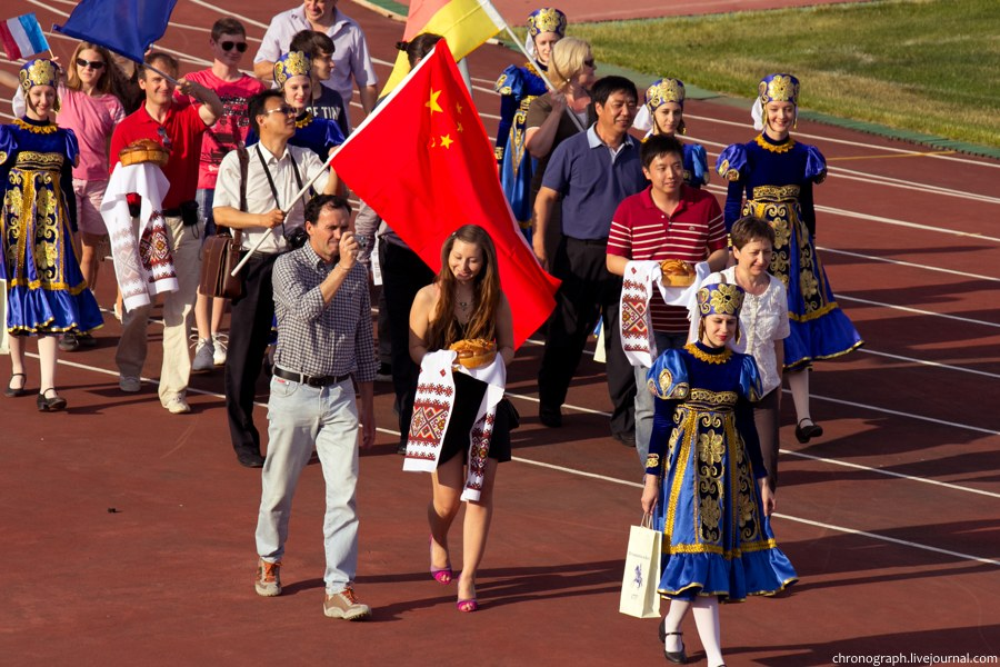 Представители китайской делегации на праздновании дня города Тольятти 2012